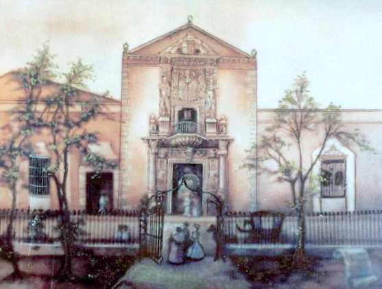 Imagen de lo que fue el portal de la casa de Francisco de Montejo, el Adelantado, construida hacia 1645, en la Plaza Grande de Mérida (Plaza De La Independencia), Yucatán, México. Reproducción de litografía del siglo XIX, hacia 1875, disponible en archivos públicos de la Biblioteca Cepeda Peraza de Mérida Yucatán, escaneada por User:Comvaser